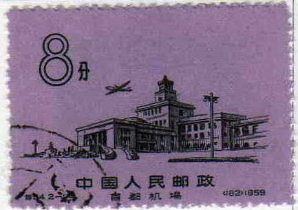 北京首都国際空港開港を記念する中国郵政が発行した当時のターミナルビルを描く8分切手。